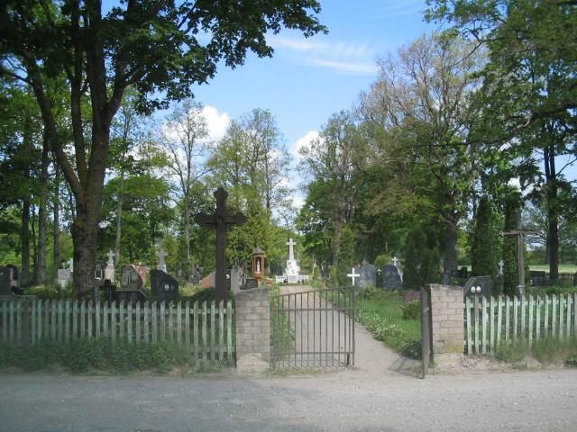 Šalpėnų kapinės, Šilutės raj.